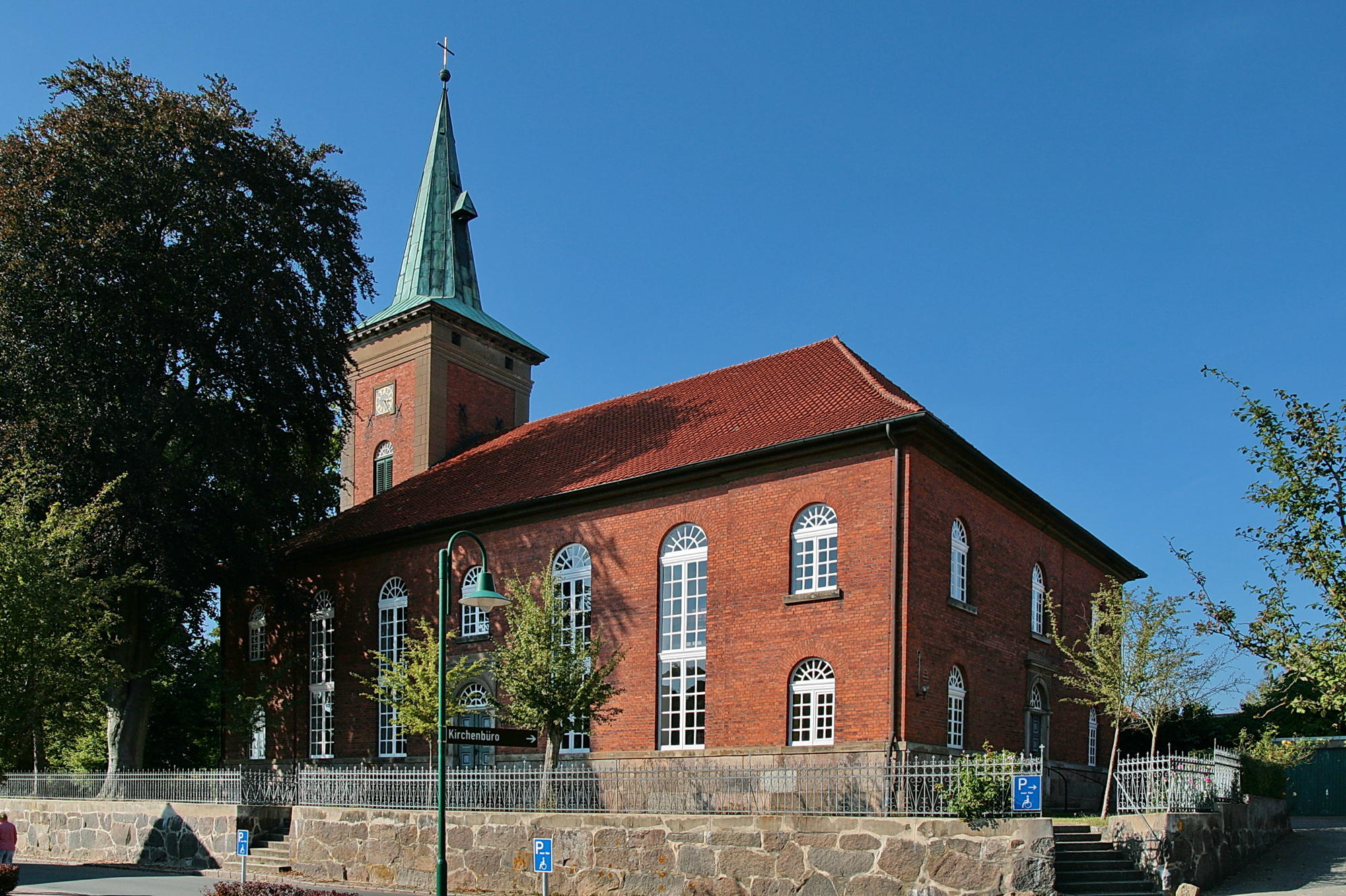 Kirche von 1843 in Himbergen, Niedersachsen, Deutschland